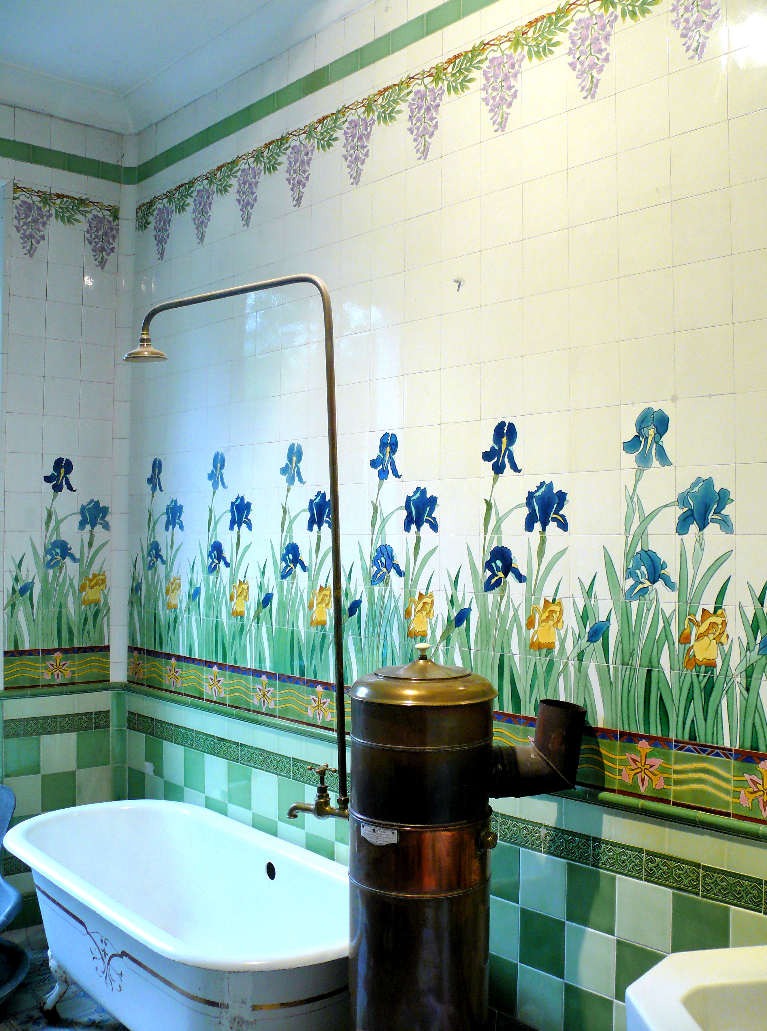 Barcelonnette - Villa du Parc du Mercantour - Salle de bains